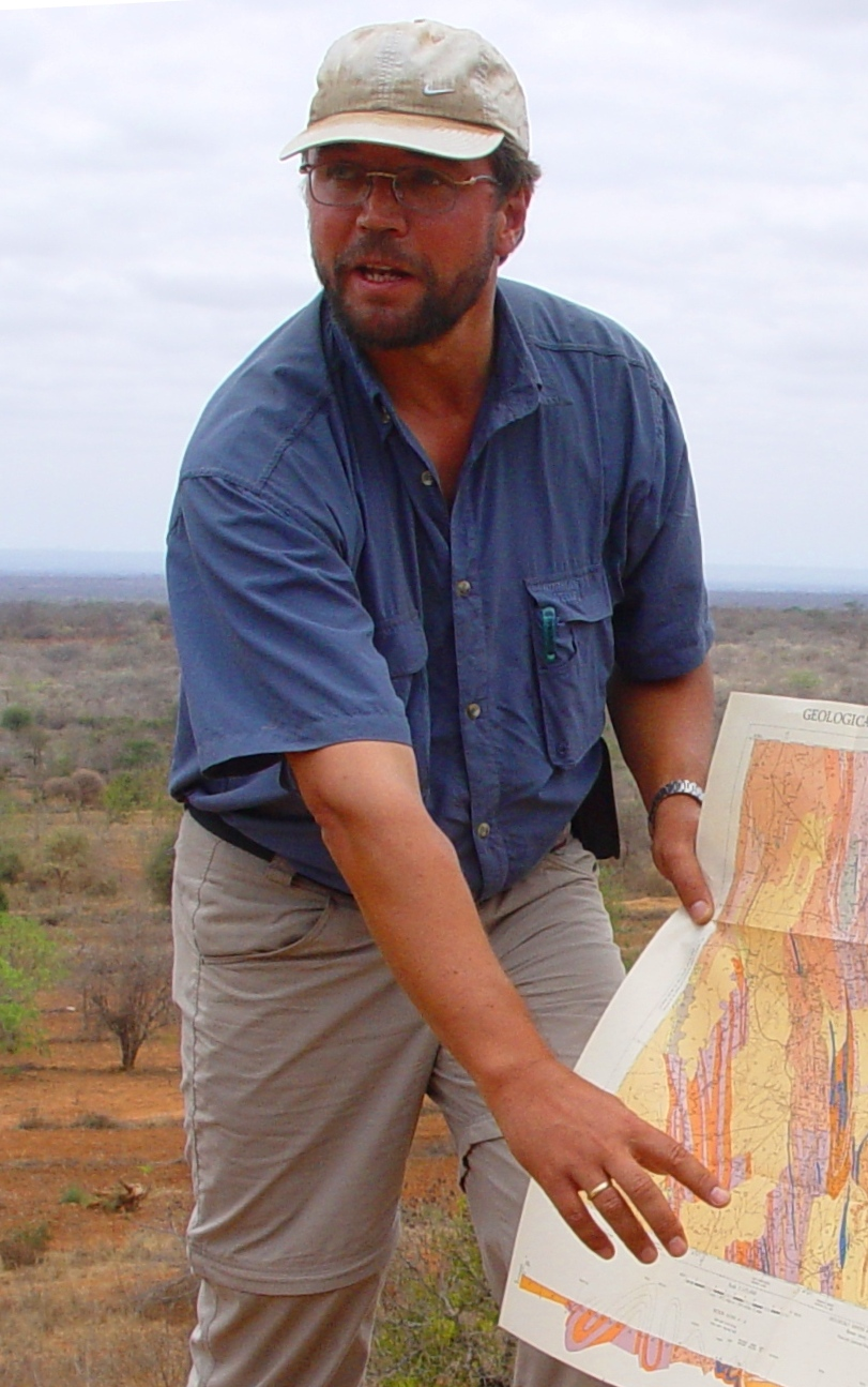 Prof. Dr. Jürgen Runge, 2004